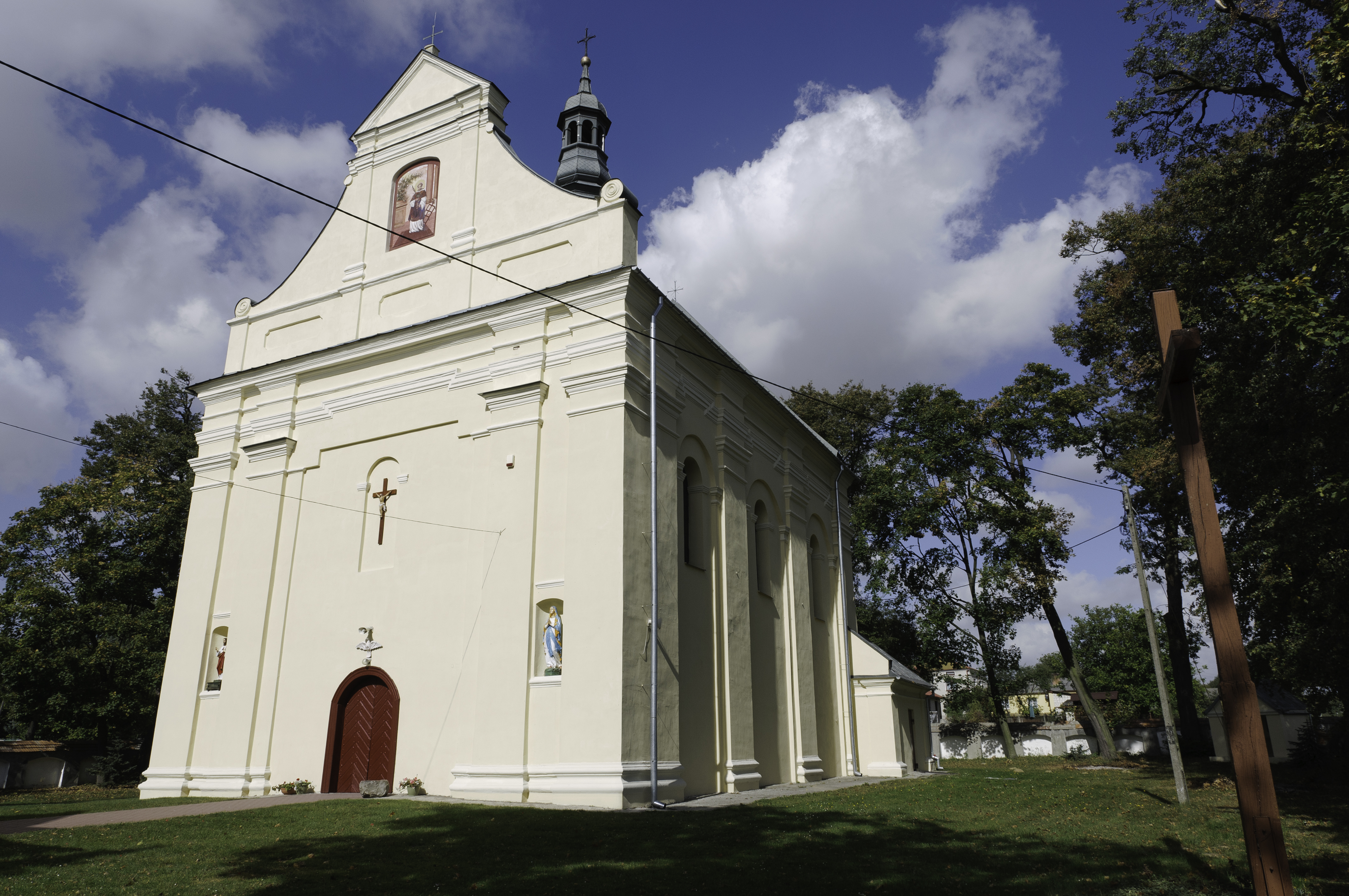 Żółkiewka - kościół p.w. św. Wawrzyńca (2 poł. XVIII) w zespole kościoła parafialnego